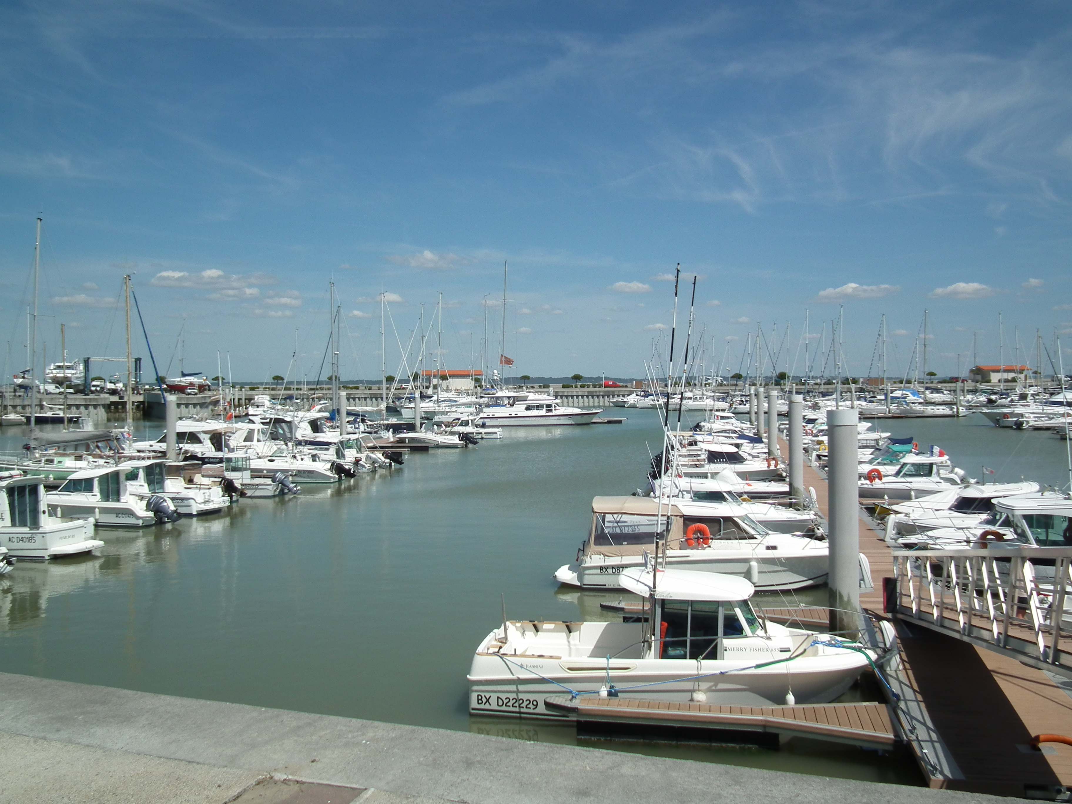 Bateaux à Port-Médoc (Le Verdon-sur-Mer, Gironde, France)